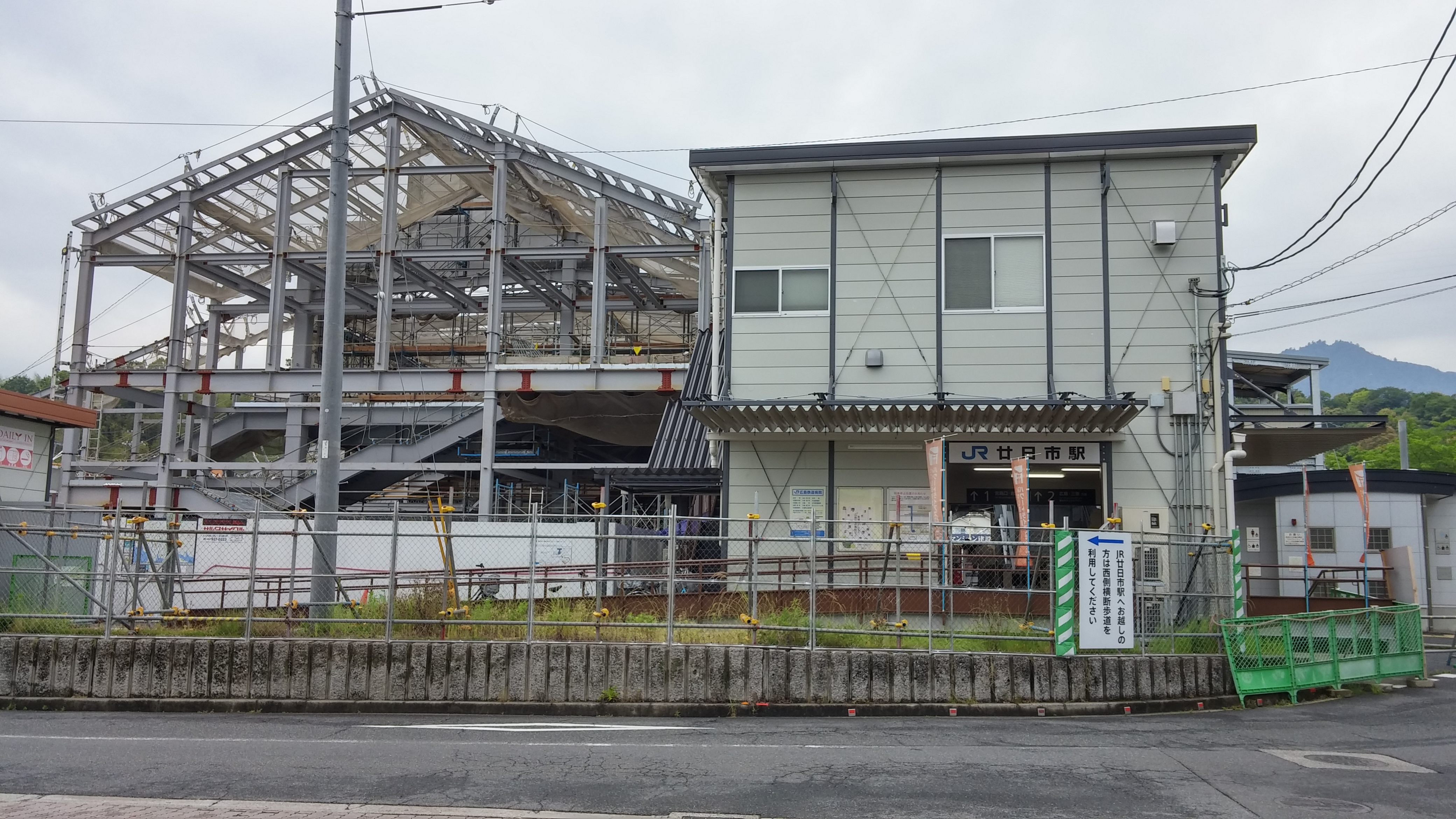 JR廿日市駅仮駅舎